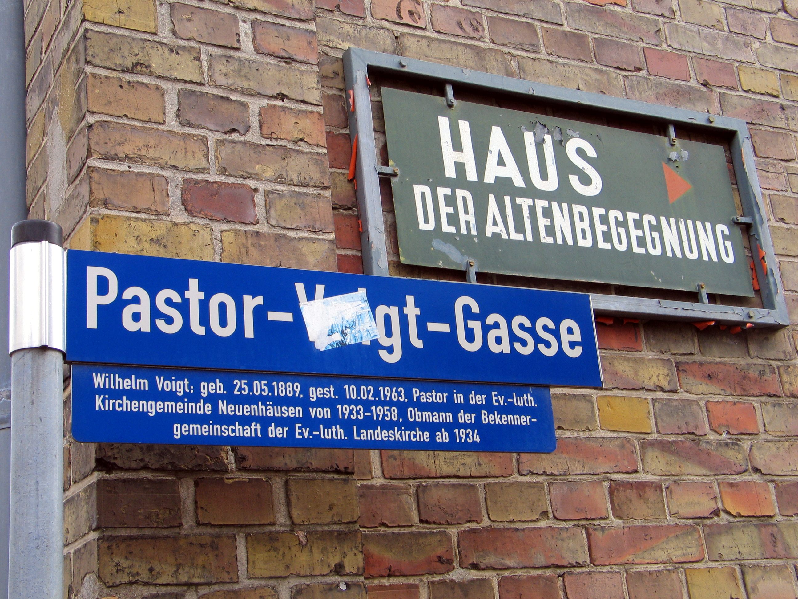 Straßenschild der Pastor-Voigt-Gasse in Celle mit einer Legenden-Tafel: „Wilh. Voigt, geb. 25.05.1989, gest. 10.02.1963, Pastor in der Ev.-luth. Kirchengemeinde Neuenhäusen von 1933 - 1958, Obmann der Ev.-luth. Landeskirche ab 1934“ ...